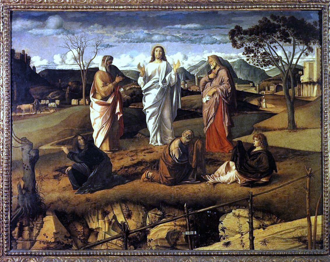 BELLINI, Giovanni Transfiguration of Christ Oil on wood, 115 x 152 cm Museo Nazionale di Capodimonte, Naples